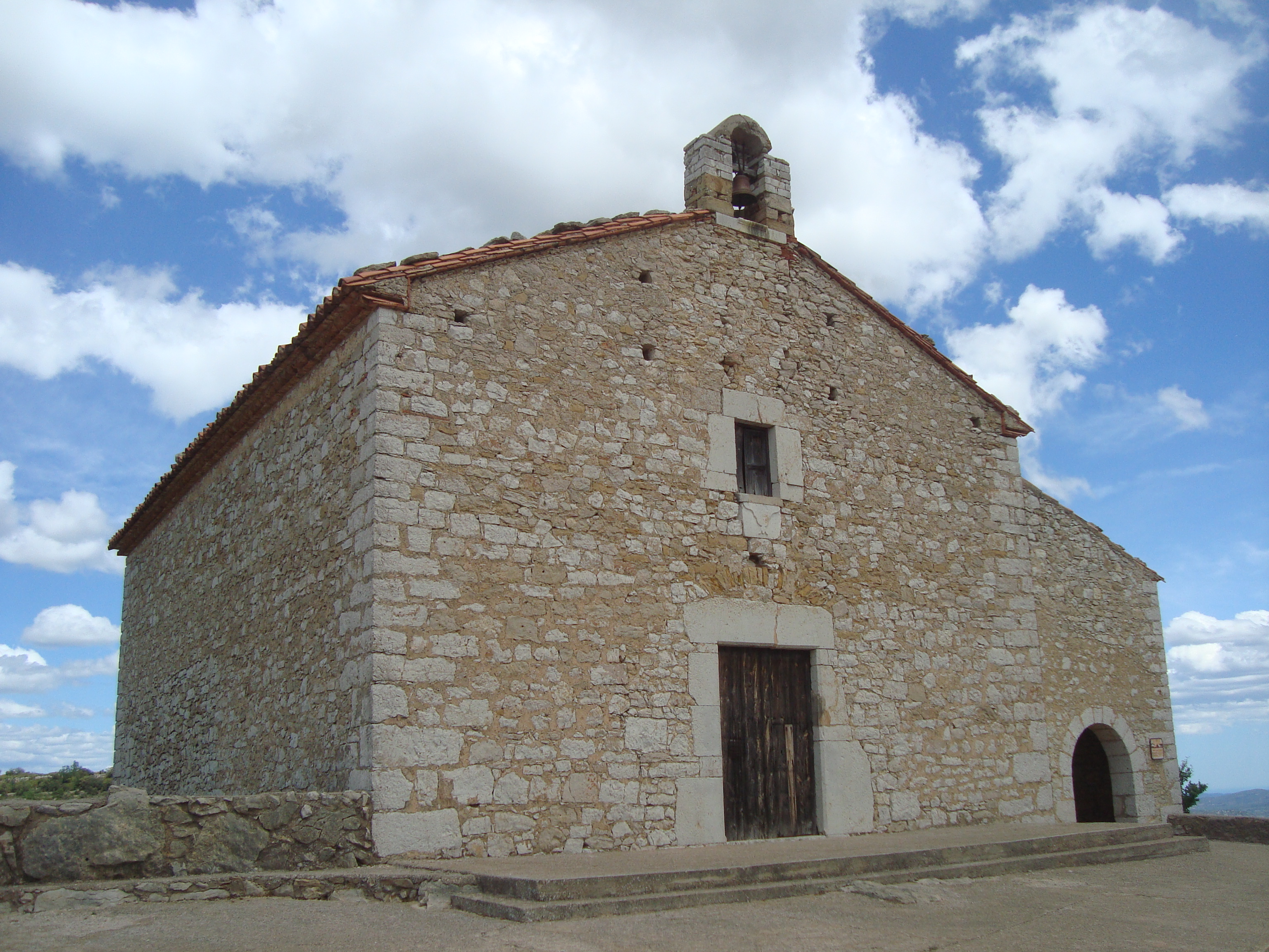 Ermita de Sant Cristòfol (Culla) 02.051-007.